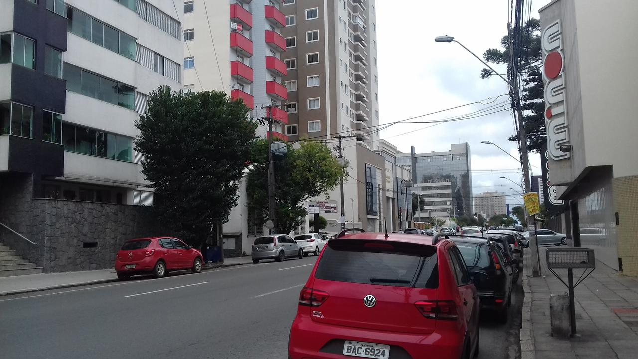 Prédios da Rua Voluntários da Patria